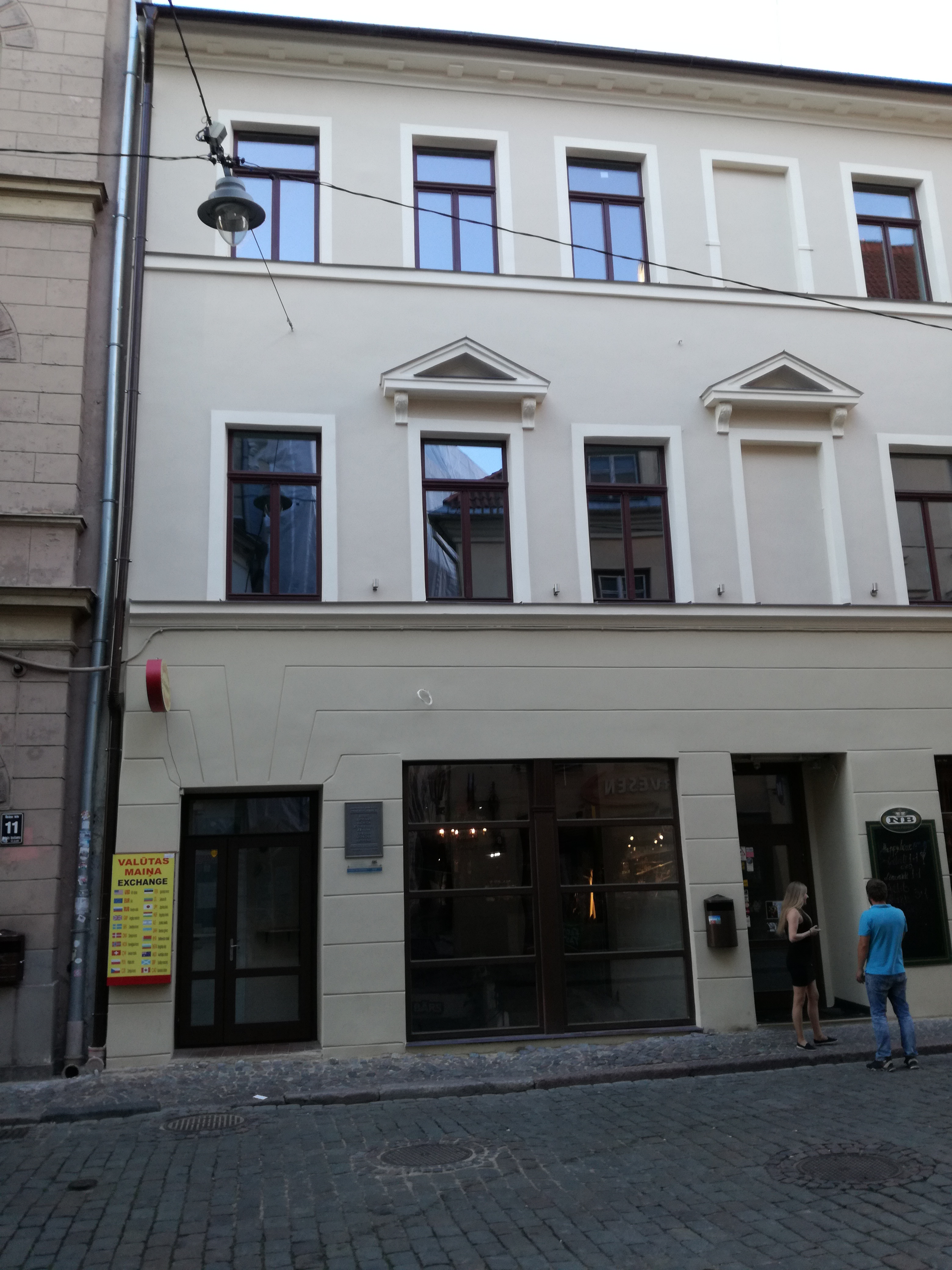 Вецрига